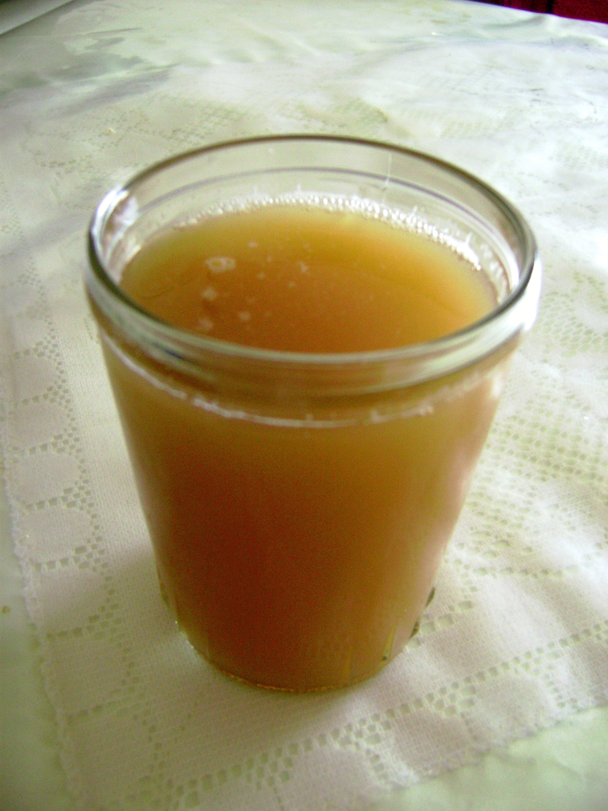 Chicha de jora. Huancayo, Perú.